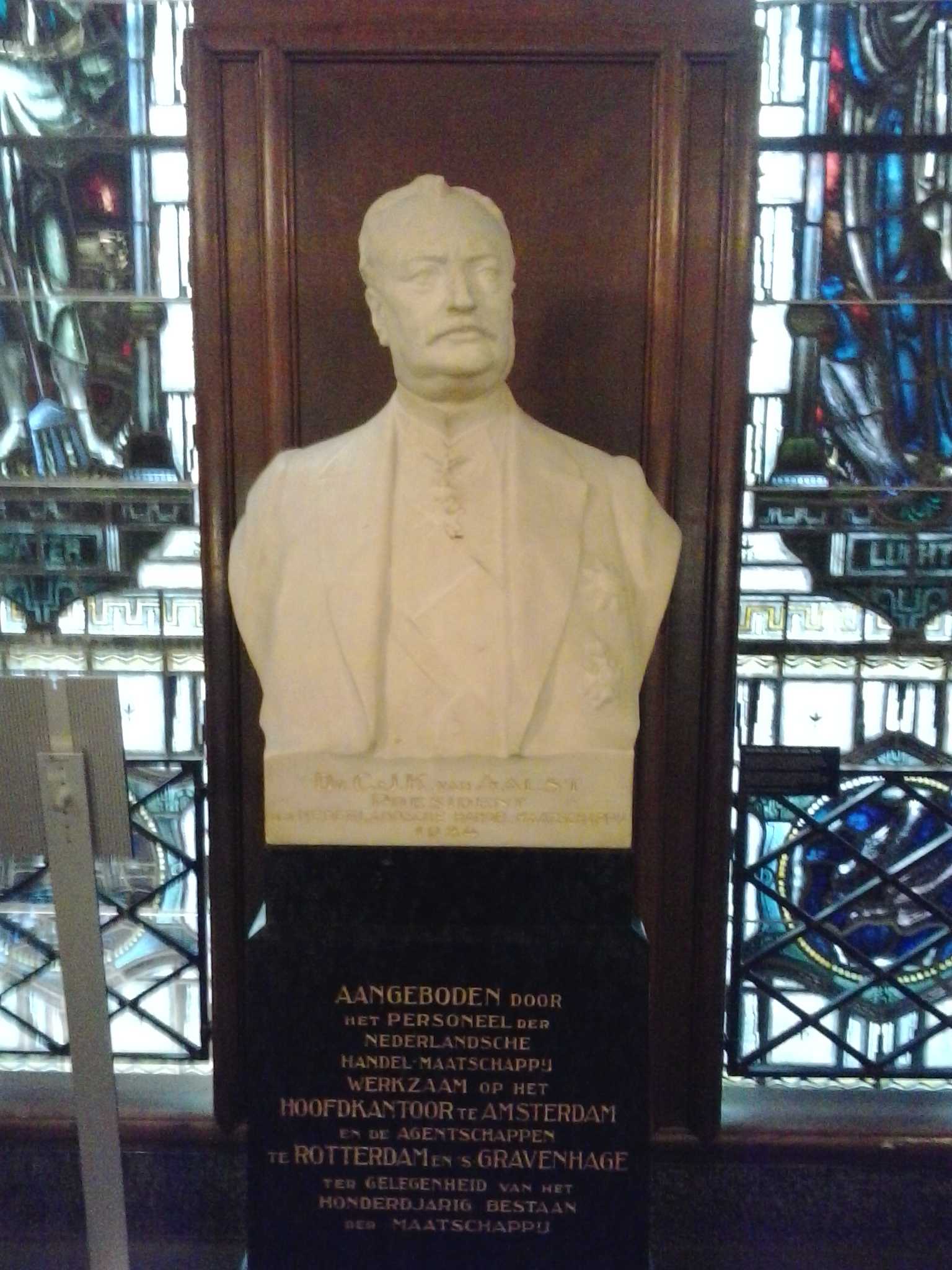 Borstbeeld van C.J.K. van Aalst, door Toon Dupuis (1877-1937), aangeboden door het personeel der Nederlandsche Handel-Maatschappij, ter gelegenheid van het honderdjarig bestaan der maatschappij, 1924, in het gebouw De Bazel in Amsterdam.